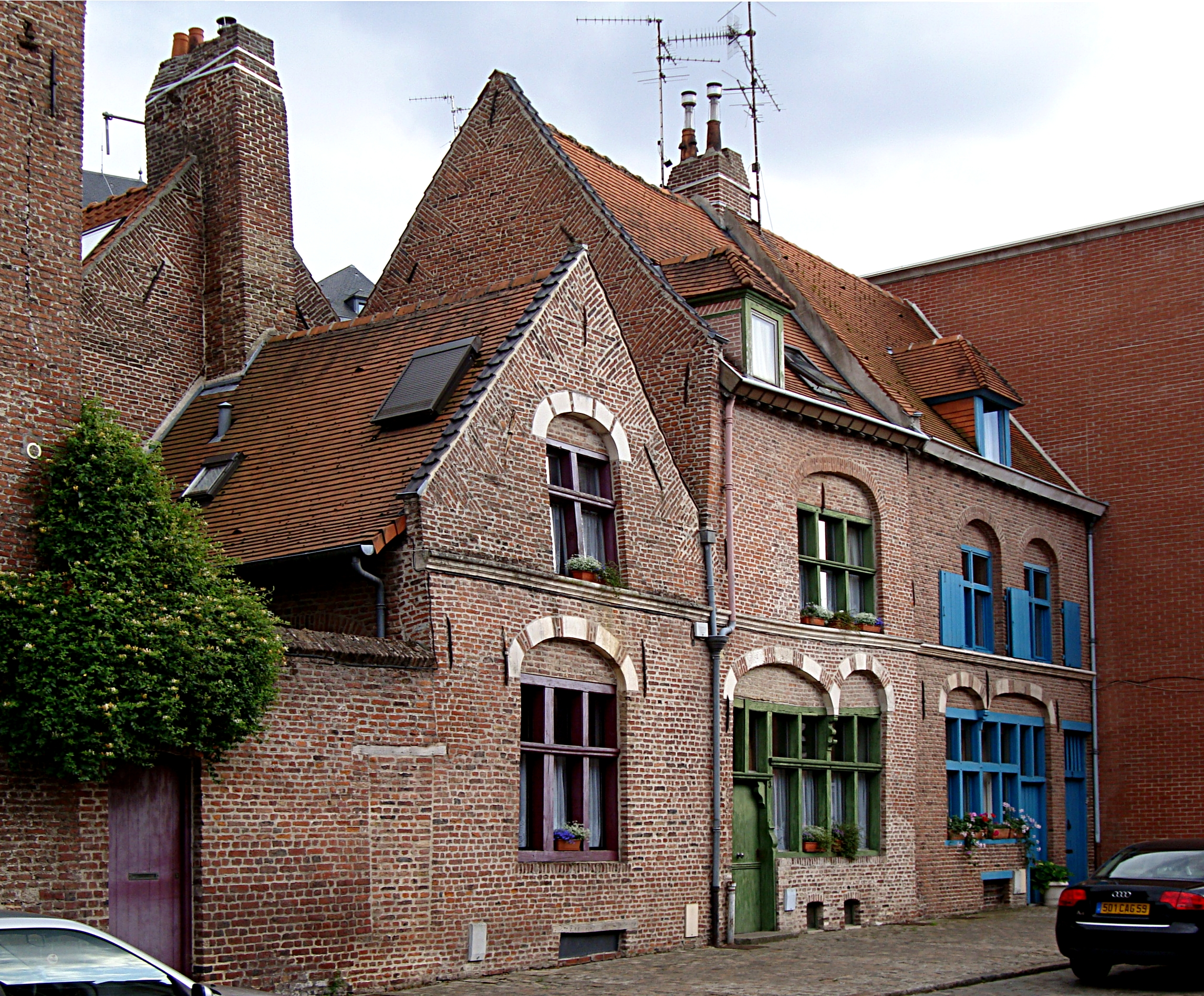 Maisons à arcures du XVIIe rue Benvignat dans le Vieux-Lille à Lille (Nord).